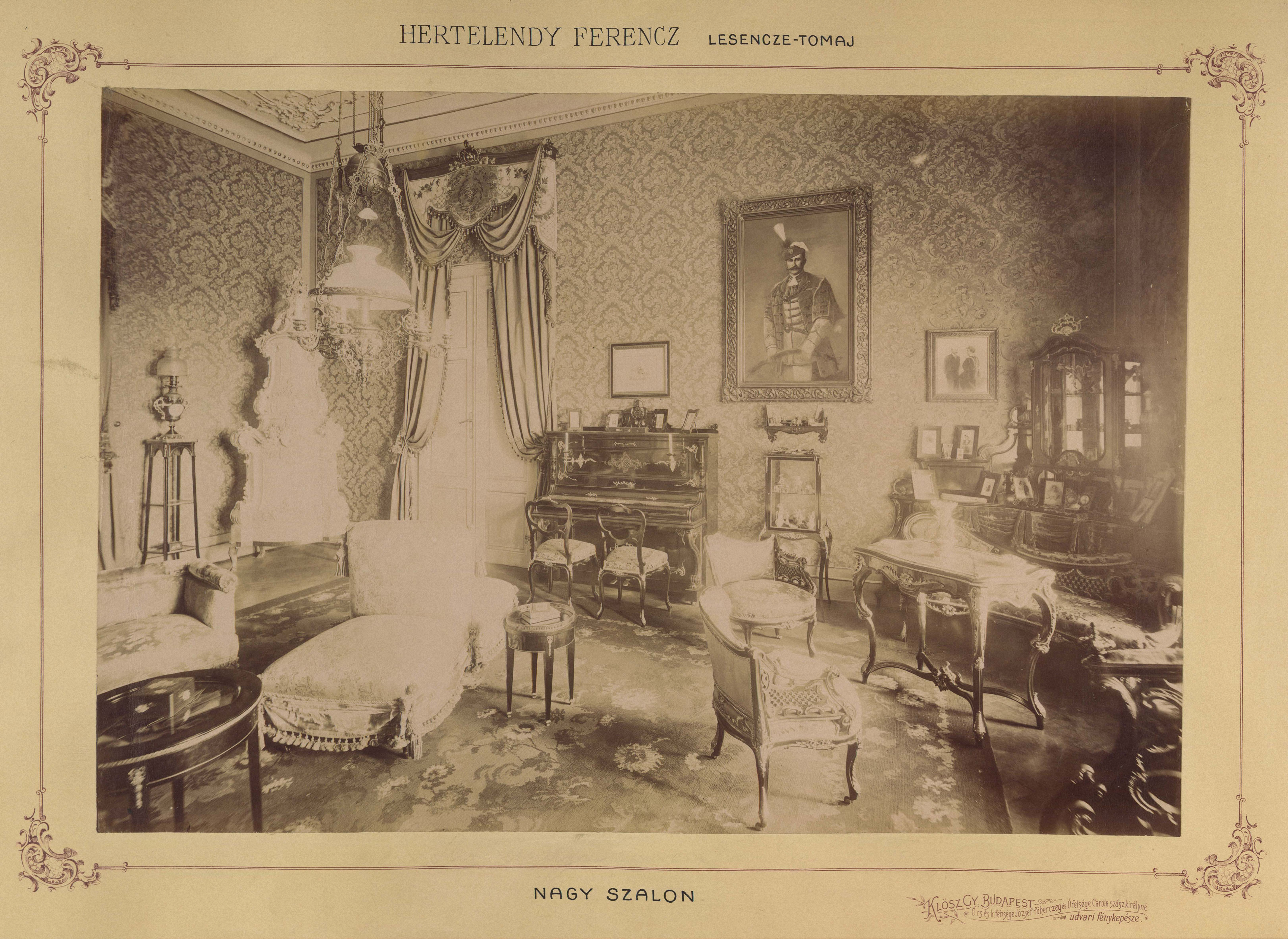 Magyarország, Lesencetomaj, a Hertelendy-kastély nagyszalonja. A felvétel 1895-1899 között készült. Location: Hungary Tags: interior, chandelier, tile stove, painting